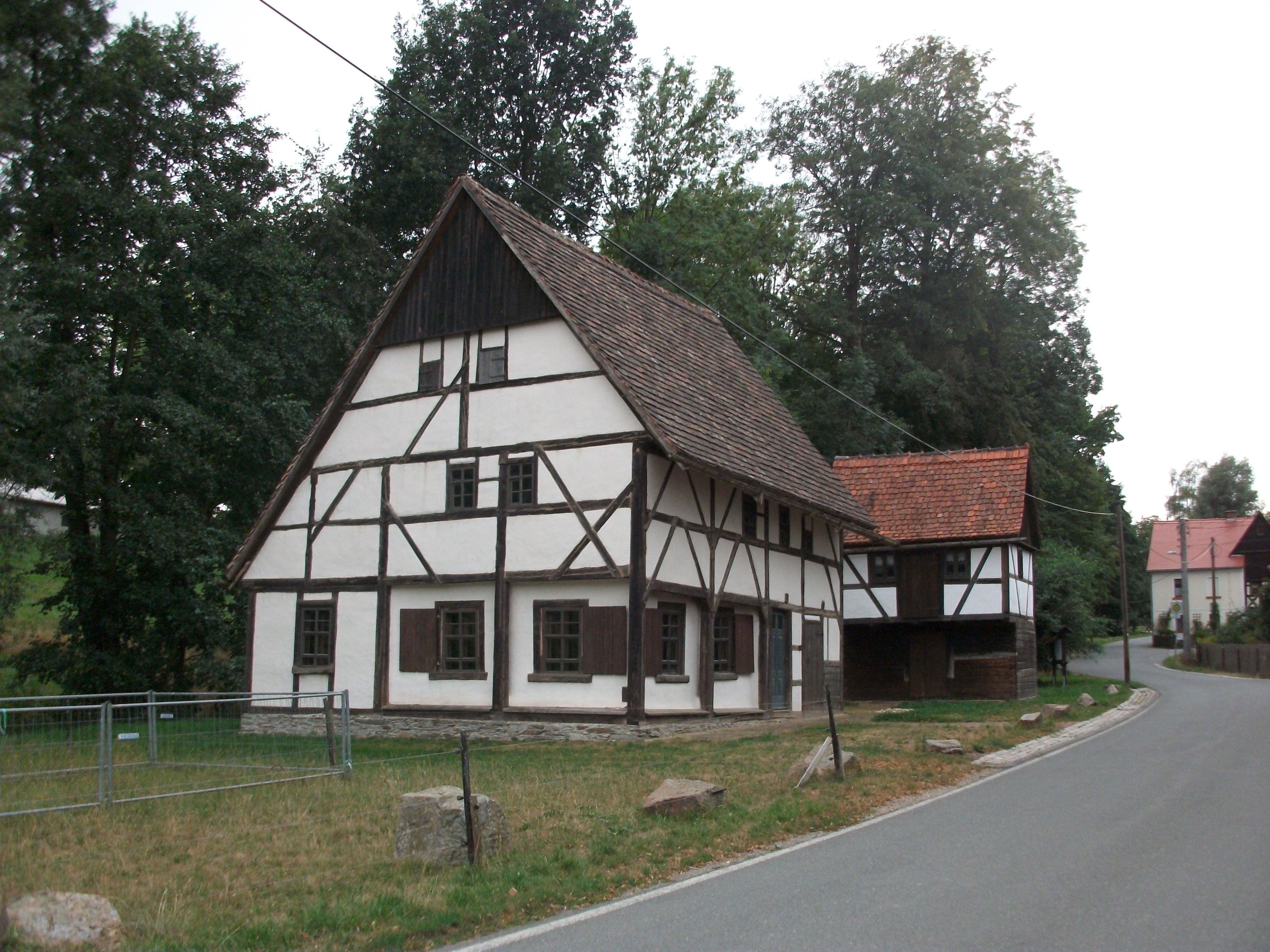 Franken (Waldenburg), Dorfstraße 14a